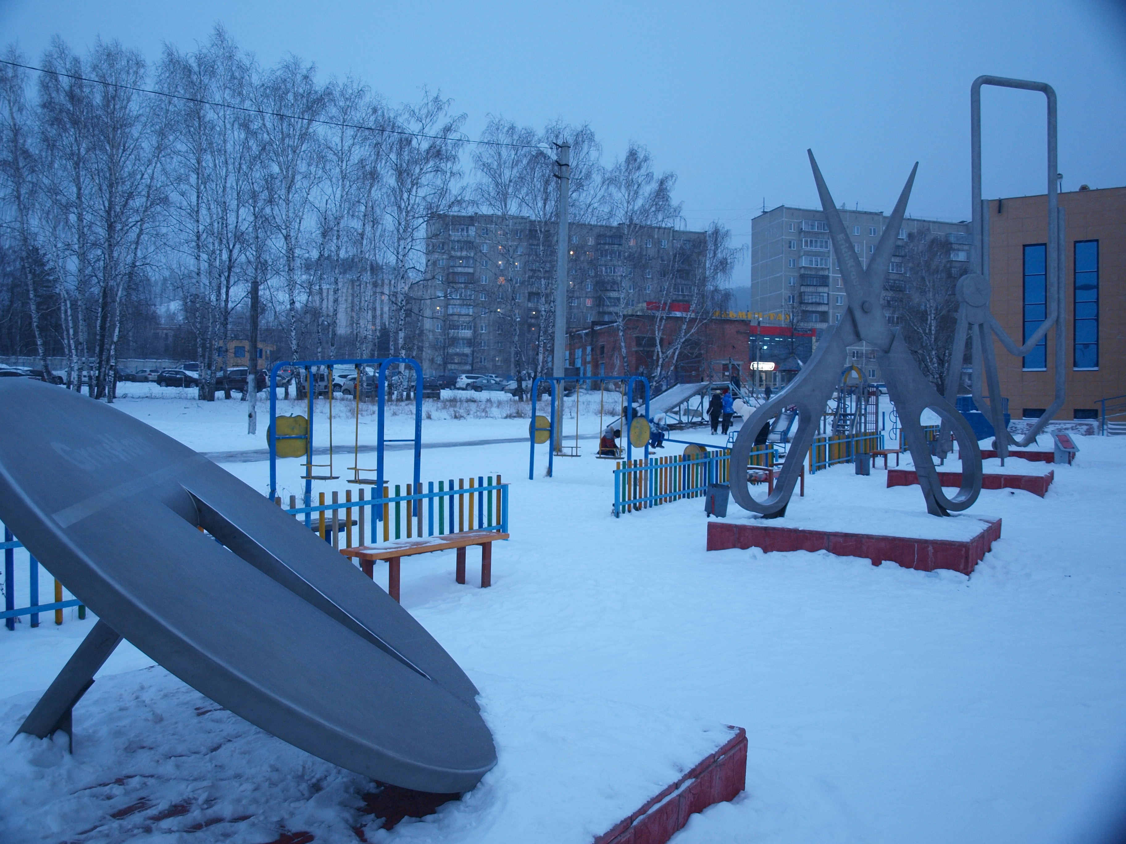 Парк гигантских канцелярских принадлежностей. Миасс, Машгородок